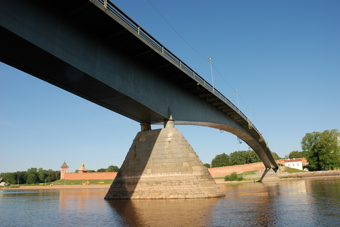 Most ve Velikém Novgorodě, pevnost je v pozadí